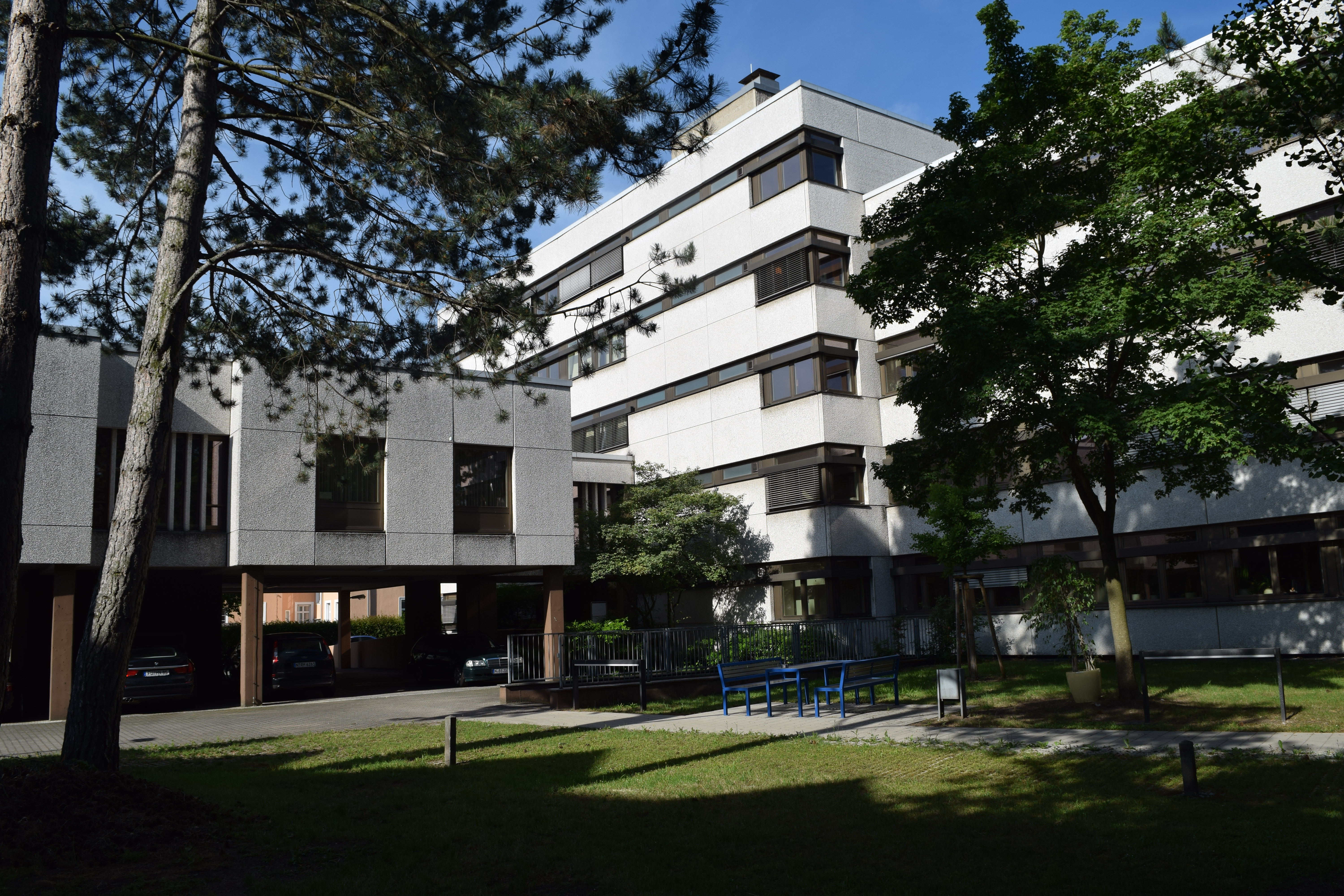 Gebäude des Finanzgerichtes Nürnberg in der Deutschherrenstraße 8